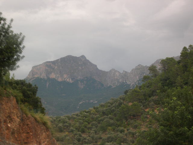 Massís del Puig Major vist des de la Vall de Sóller (Penyal del Migdia). Mallorca.